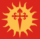 Flag of Santiago del Estero, Argentina.